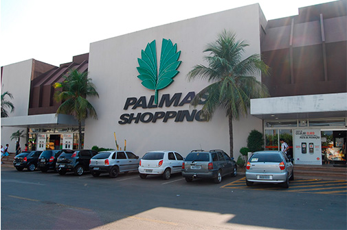 Palmas shopping entrada principal